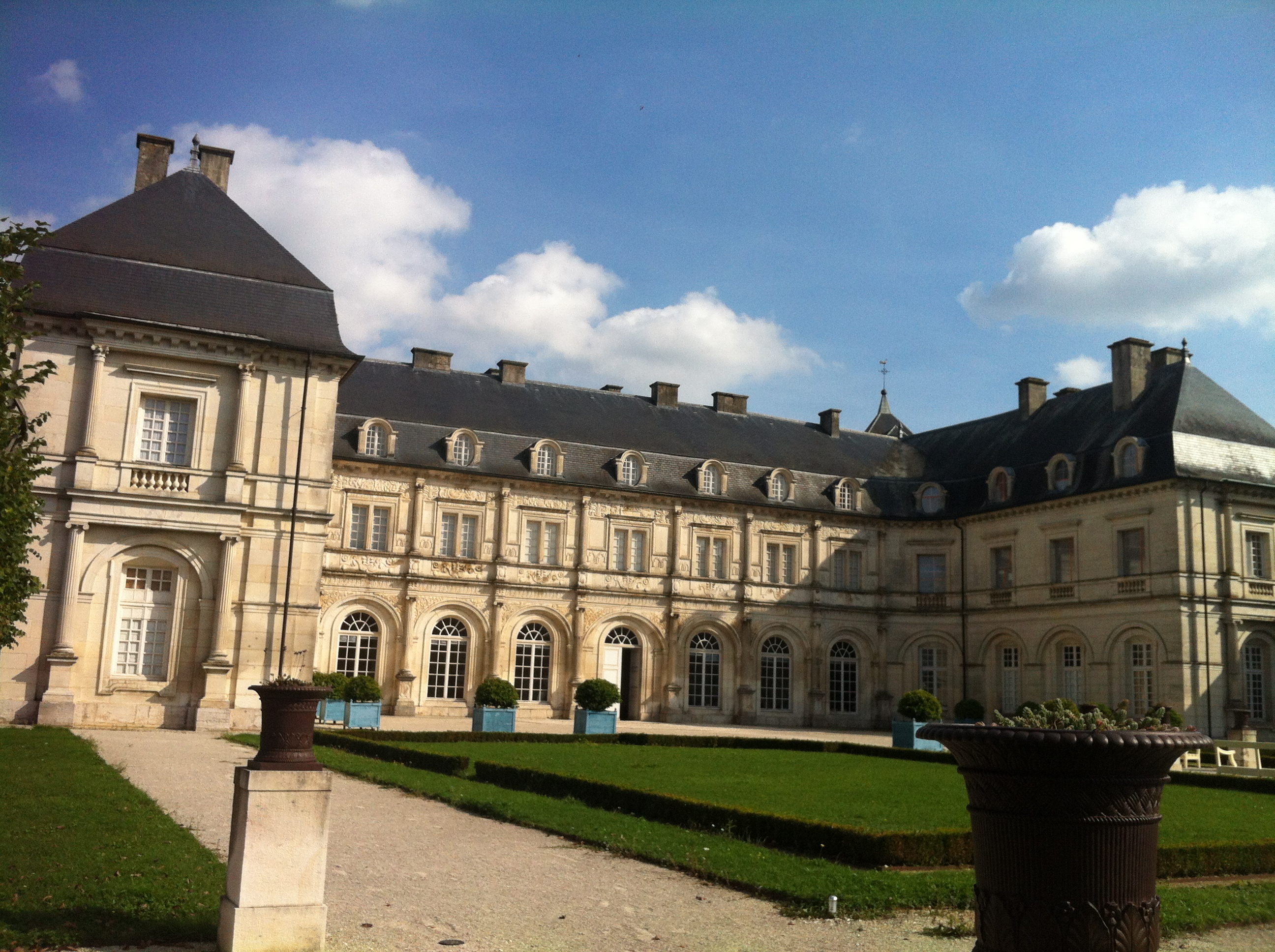 Château de Champlitte_cour d'honneur .